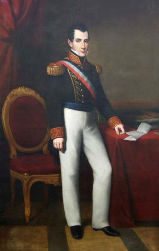 Presidente José Joaquín Prieto, oleo sobre tela, 2.22 x 1.42.